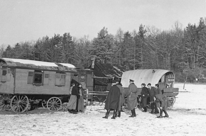 Renningen O.A. Leonberg, gestellte Zigeuner Razzia